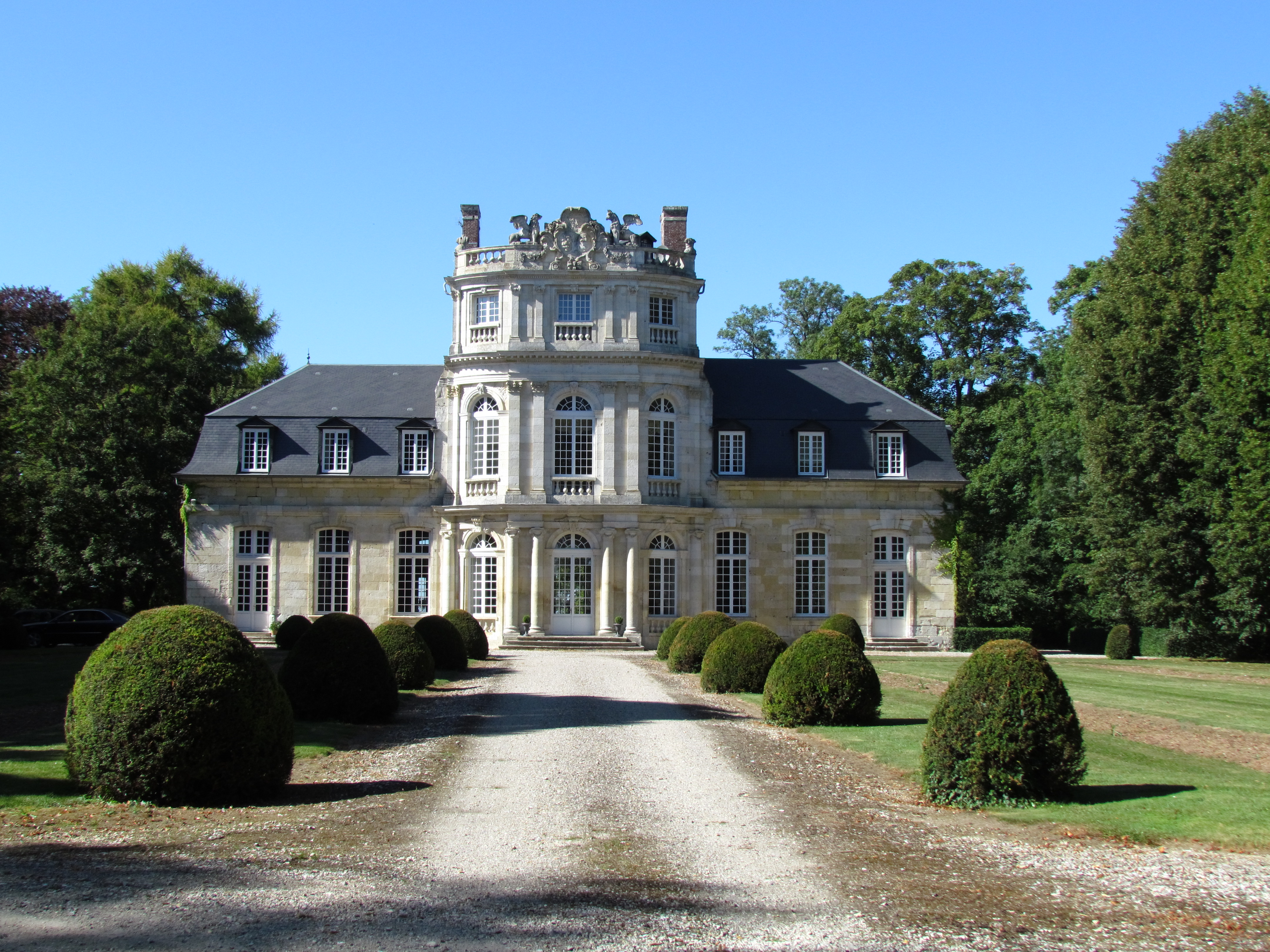 Châteaux d'Essertaux .